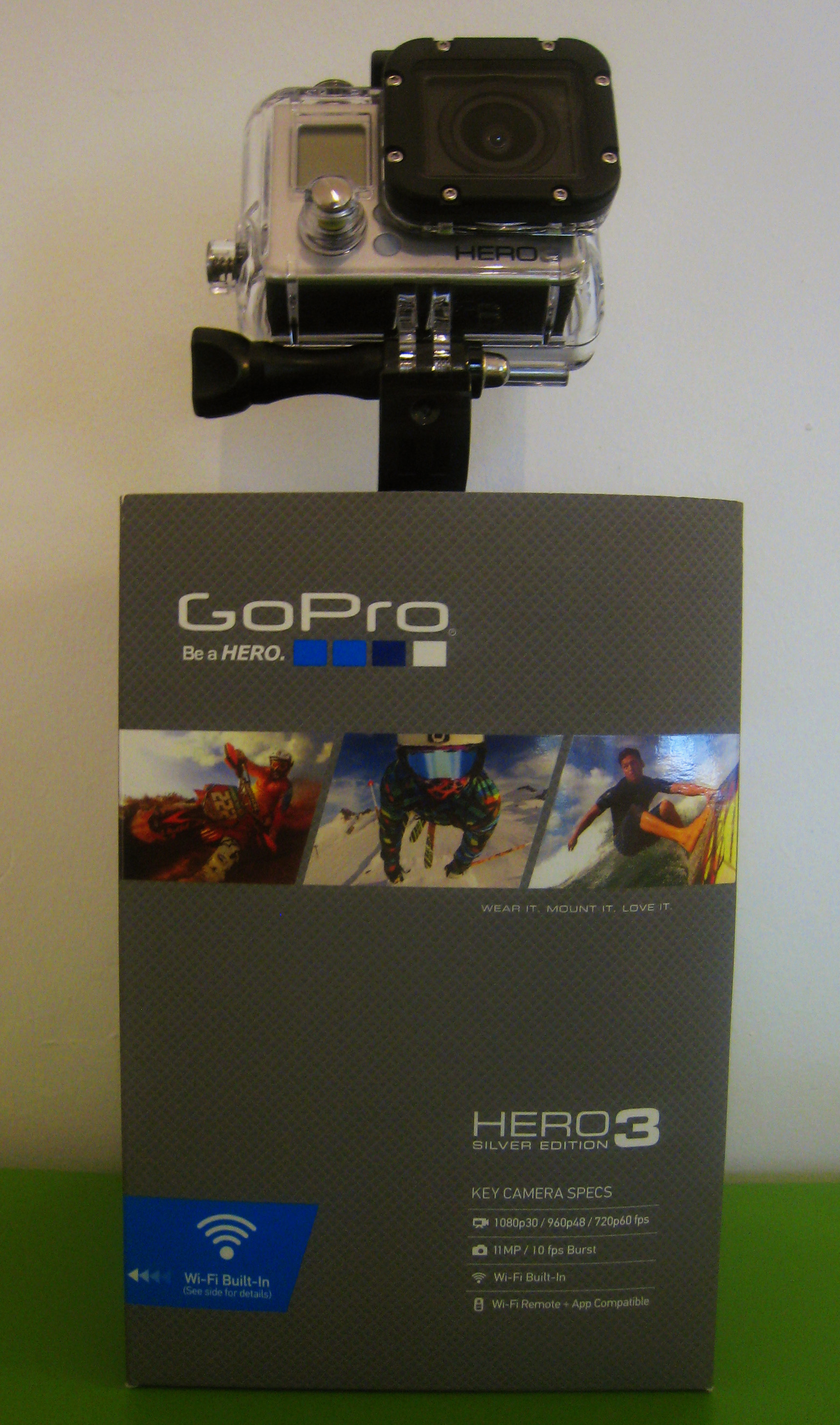 Gopro Hero 3 Silver, avec boite.